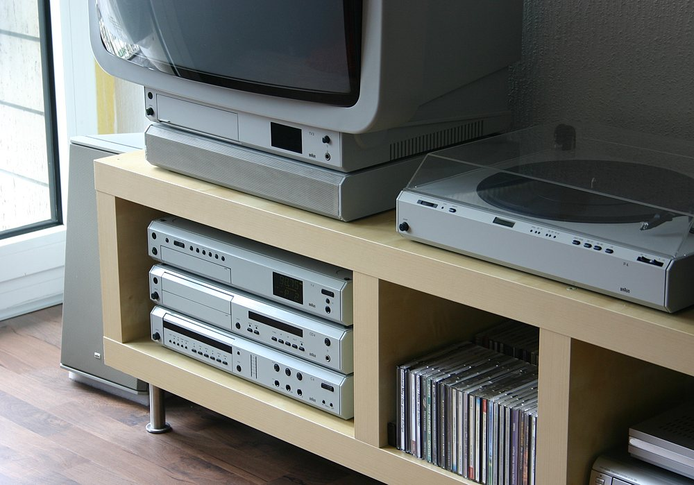 Braun Atelier Anlage in der Farbe "kristallgrau", die für HiFi-Geräte ungewöhnlich ist. Die meisten Geräte dieser Serie wurden in klassischem schwarz verkauft.